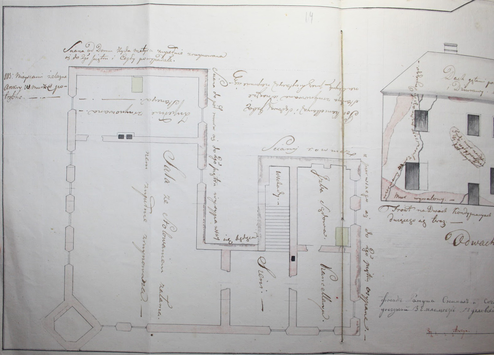 Беларуская (тарашкевіца): Наваградак (Navahradak). Ратуша